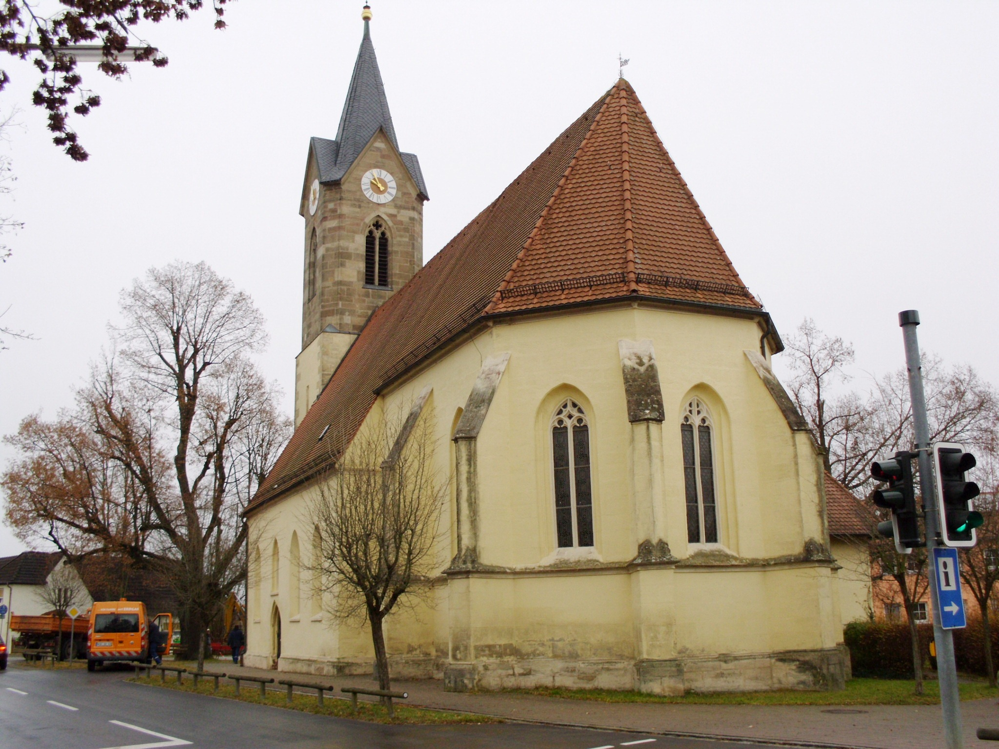 Evang. Kirche St. Jodokus in Gunzenhausen-Unterwurmbach, Landkreis Weißenburg-Gunzenhausen (Bayern), Ostchor und Südseite